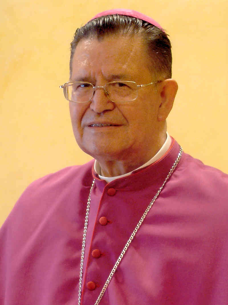 Antonio Ceballos Atienza, obispo emérito de Cádiz y Ceuta